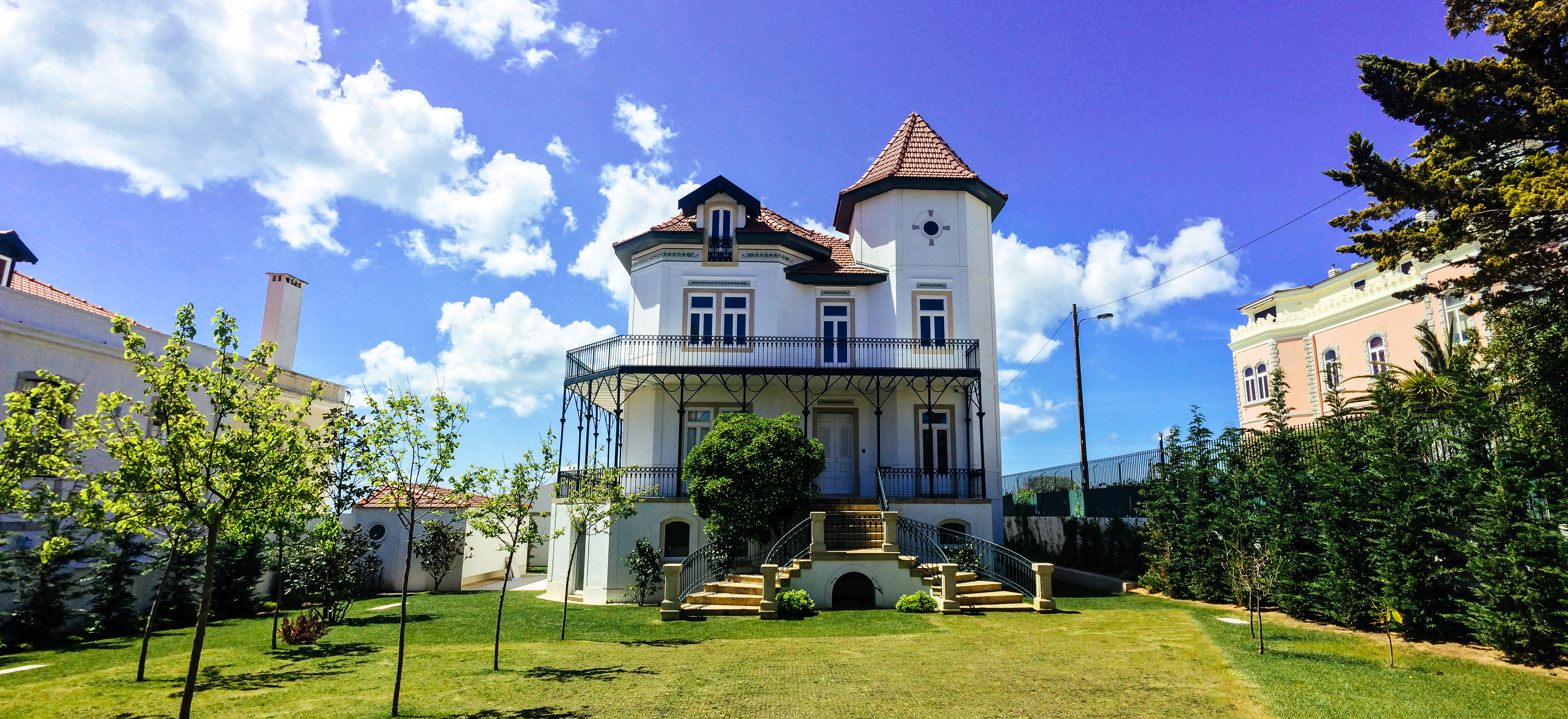 Fachada do imóvel